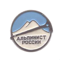 Изображение значка Альпинист России, которым награждаются альпинисты, выполнившие определённые нормативные требования